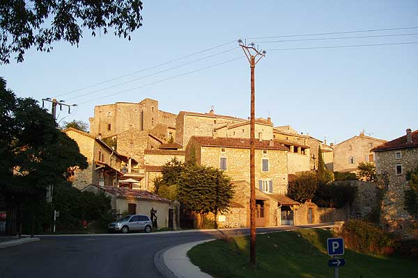 Das französische Dorf Labastide-de-Virac